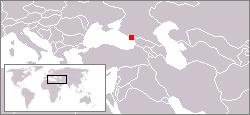 Loko de disvastigo de la Abĥaza lingvo